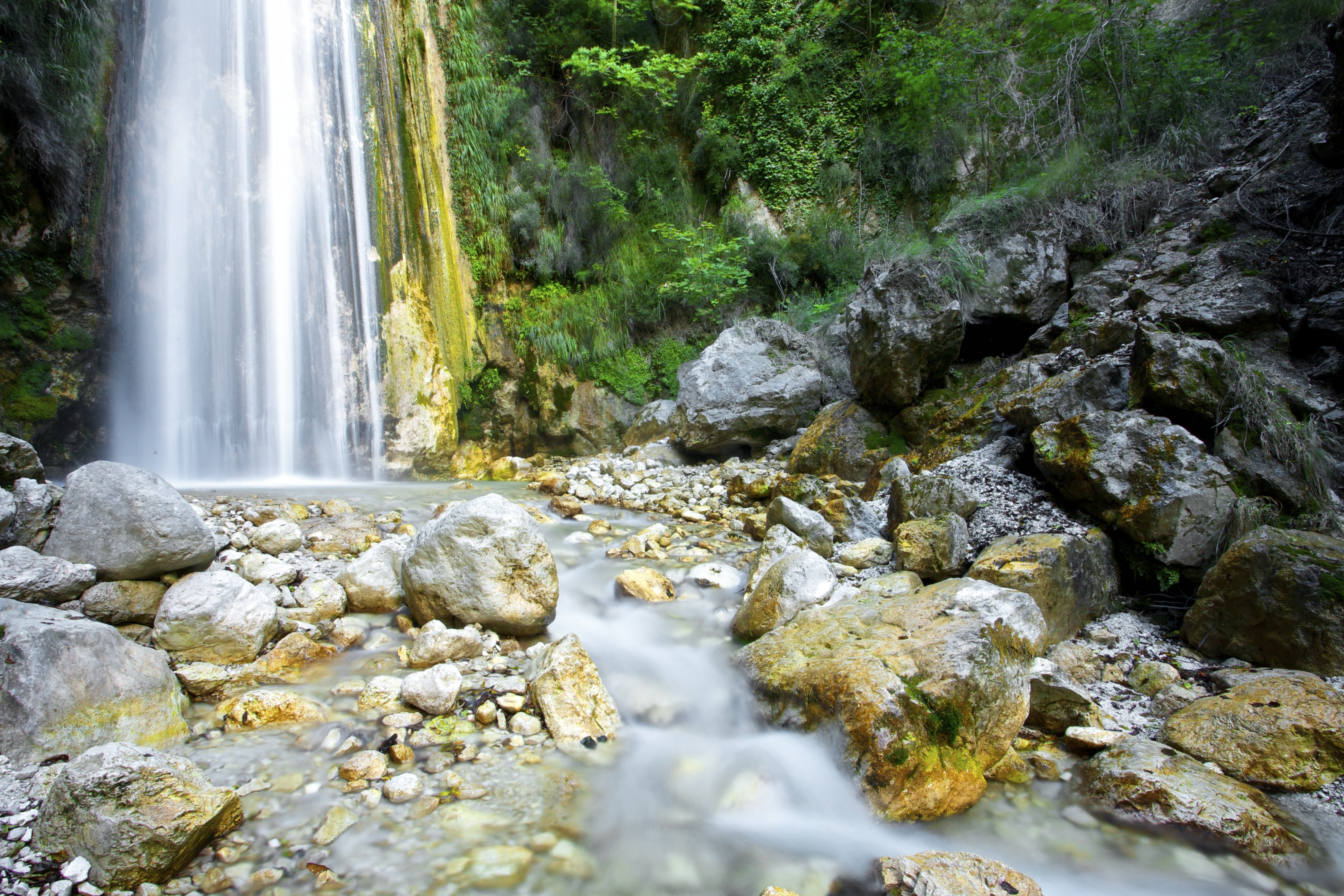 Oasi Valle della Caccia - Parco Regionale dei Monti Picentini This is a photo of a monument which is part of cultural heritage of Italy. The authorisation for taking photos of this object was provided by the World Wide Fund for Nature Italy.